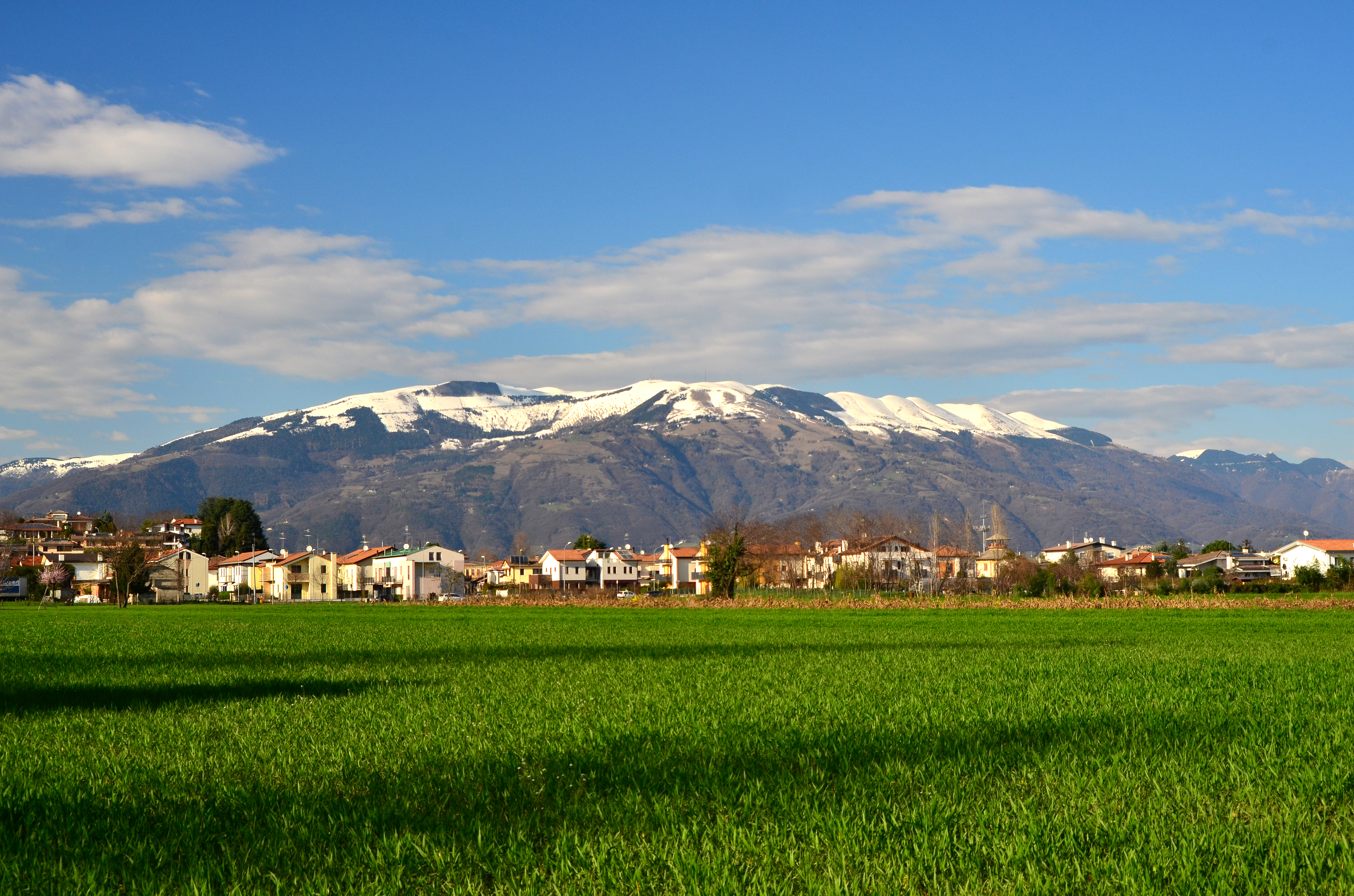 Dorsale prealpina tra Valdobbiadene e Serravalle (Q47497789) Il Monte Cesen visto dalla pianura presso Cornuda (TV)